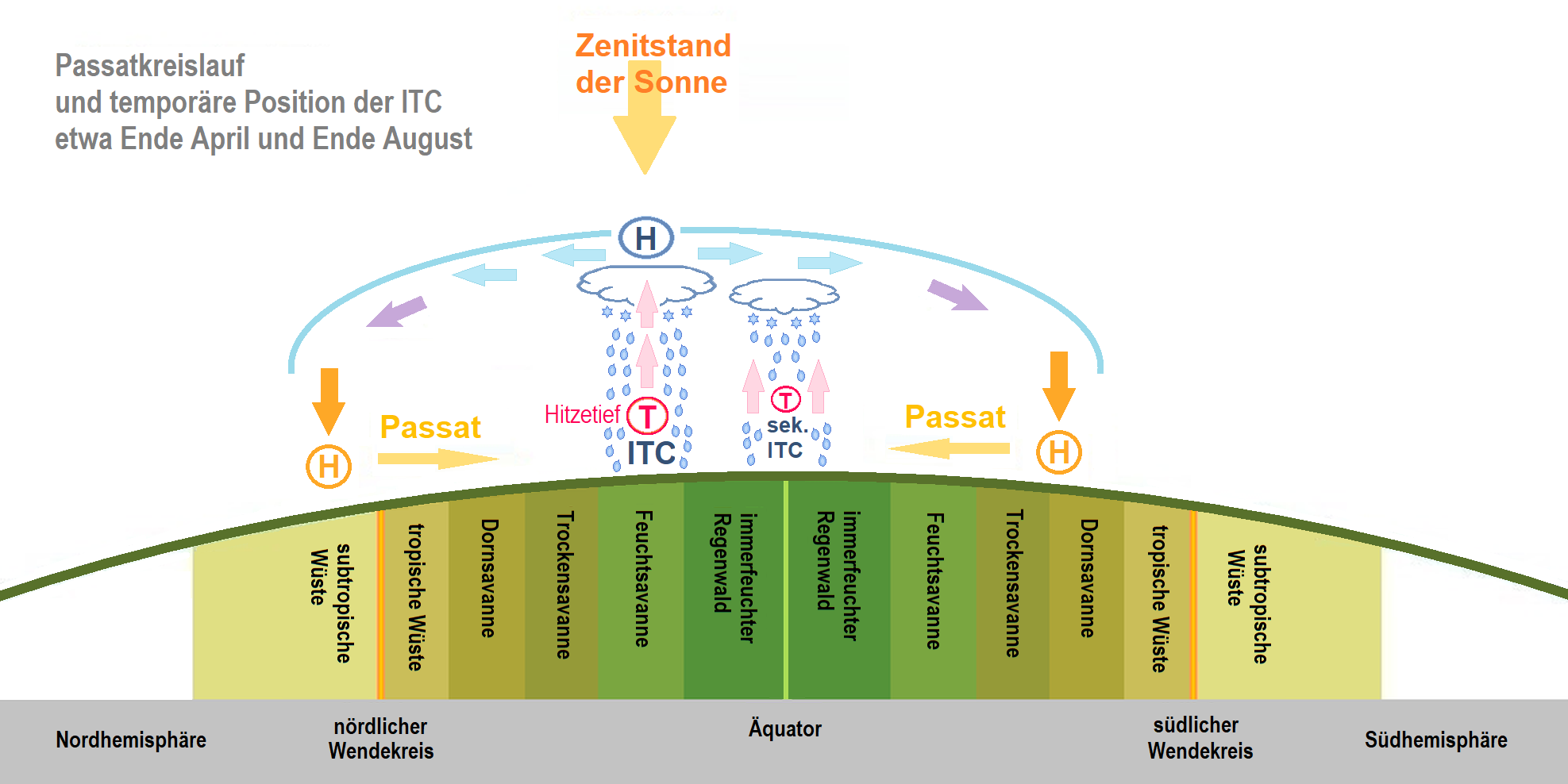 ITC und Passatkreislauf